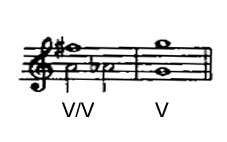 Sexta aumentada, resolución contrapuntistica